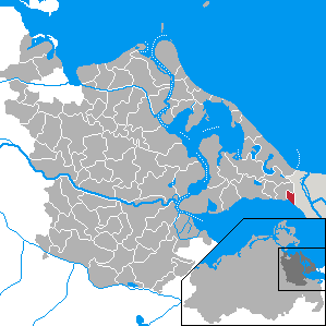 Kamminke, Landkreis Ostvorpommern, Mecklenburg-Vorpommern